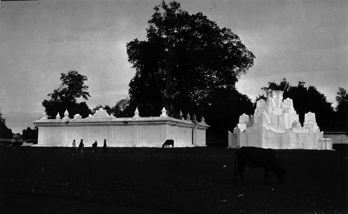 Foto. Gebouwen behorende tot de kraton van Koetaradja